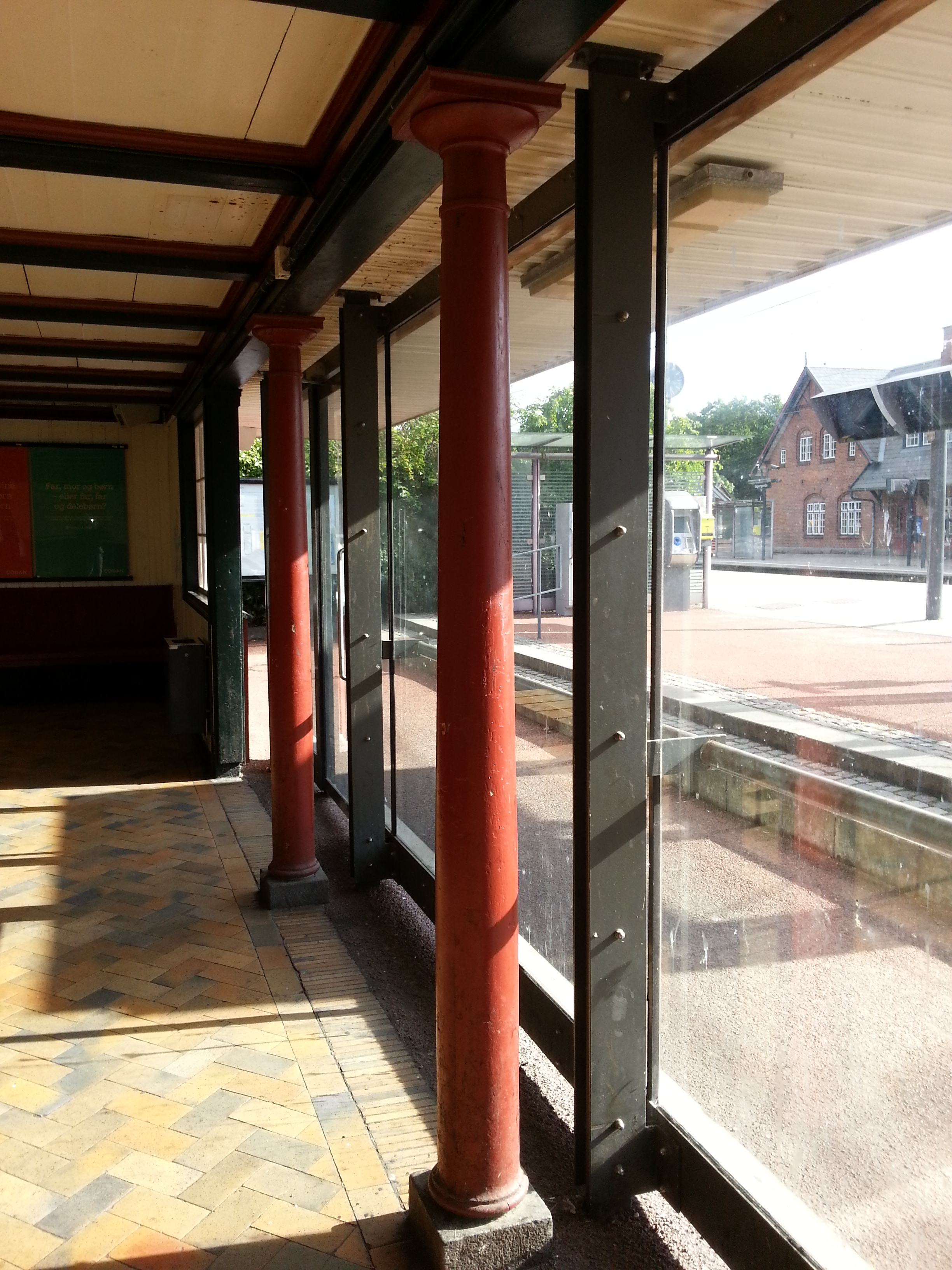 Ventesalen på Espergærde stations vestside